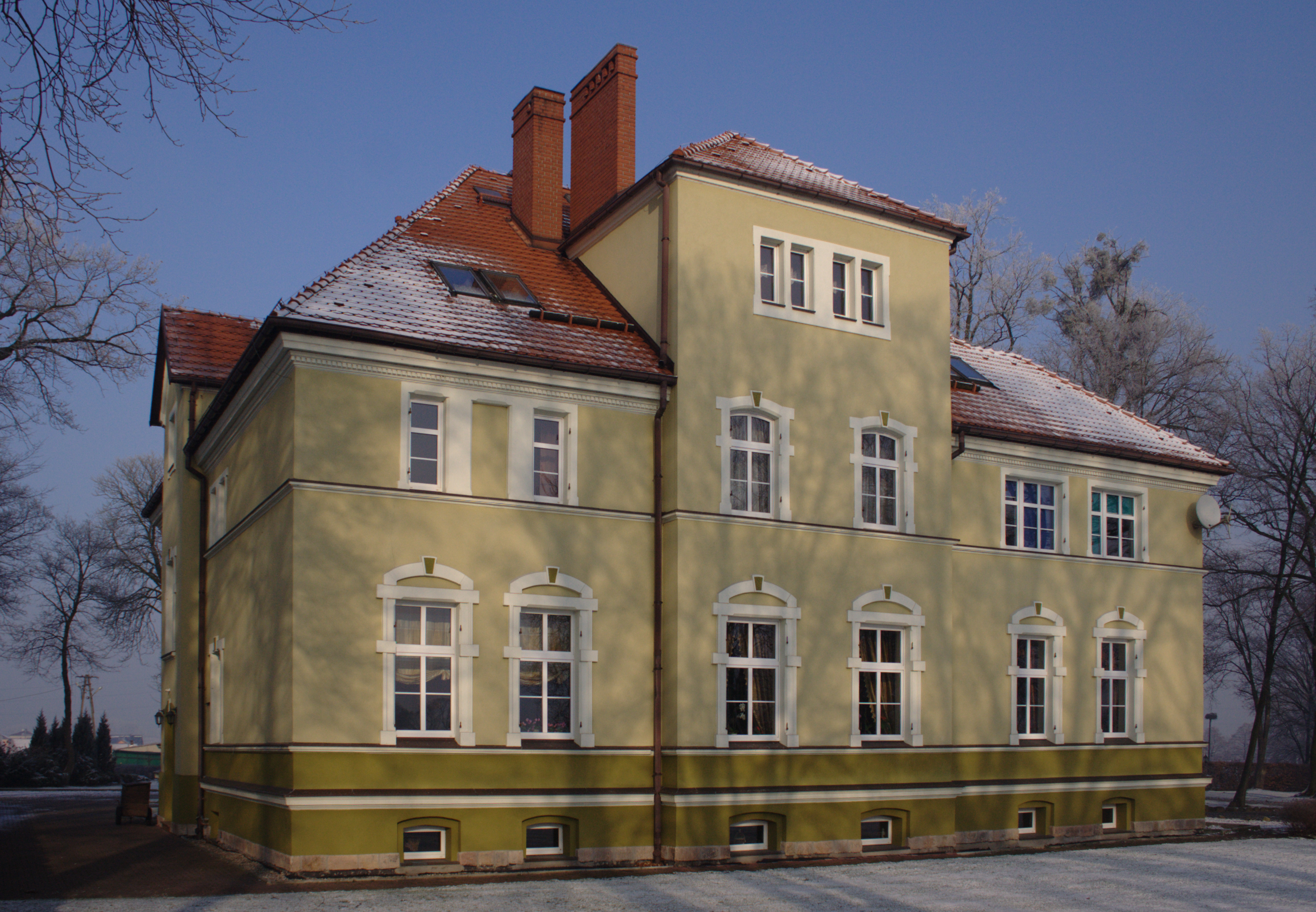 Pałac w Dzimierzu.